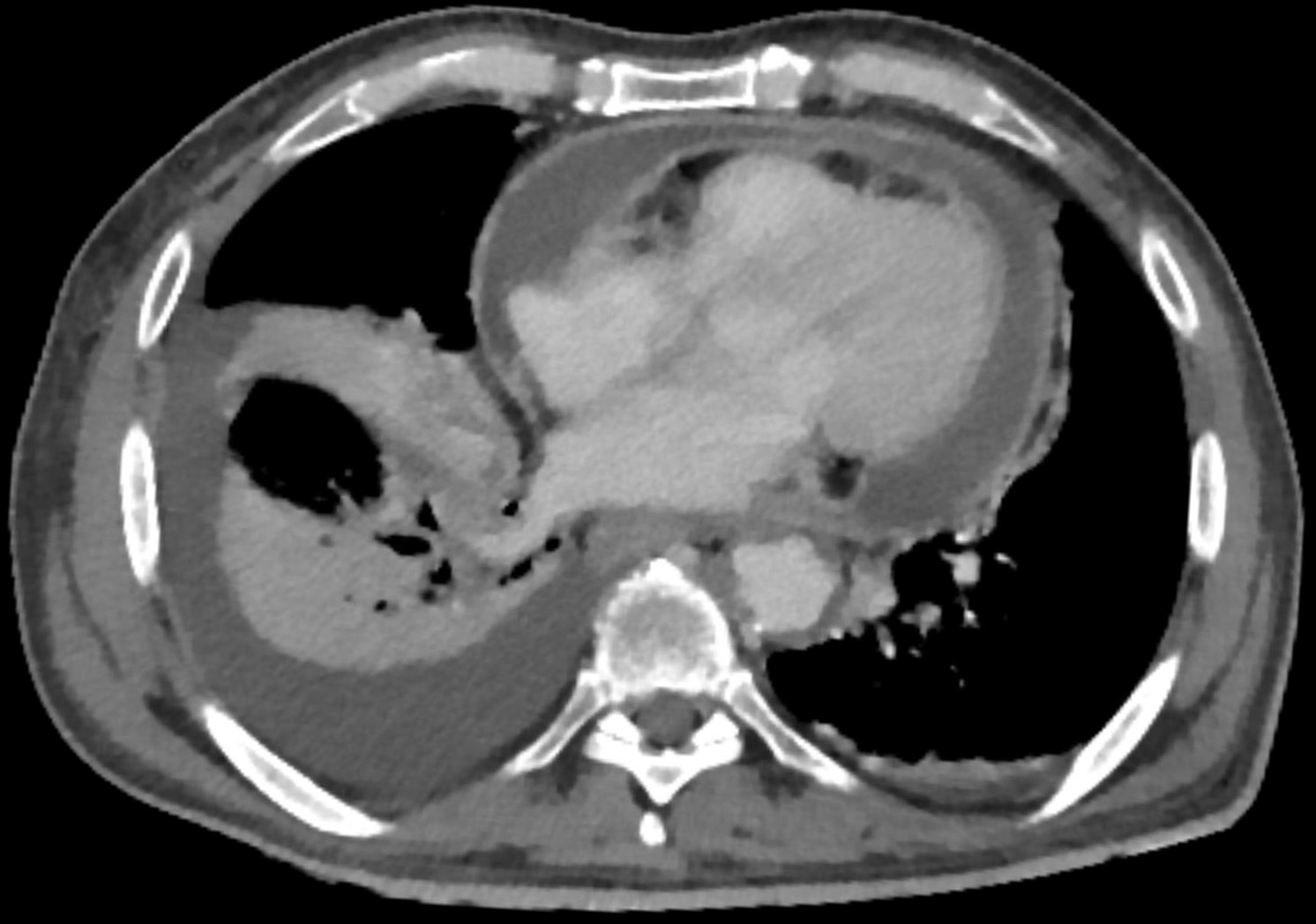 Eitrige / bakterielle Perikarditis in der Computertomographie. Man erkennt die deutliche Kontrastmittelaufnahme des Perikards. Die Dichte in der perikardialen Flüssigkeit hatte Werte um 20 Hounsfield-Einheiten, der Pleuraerguss rechts Werte um 7 Hounsfield-Einheiten. In der Folge wurde eine Perikarddrainage angelegt.